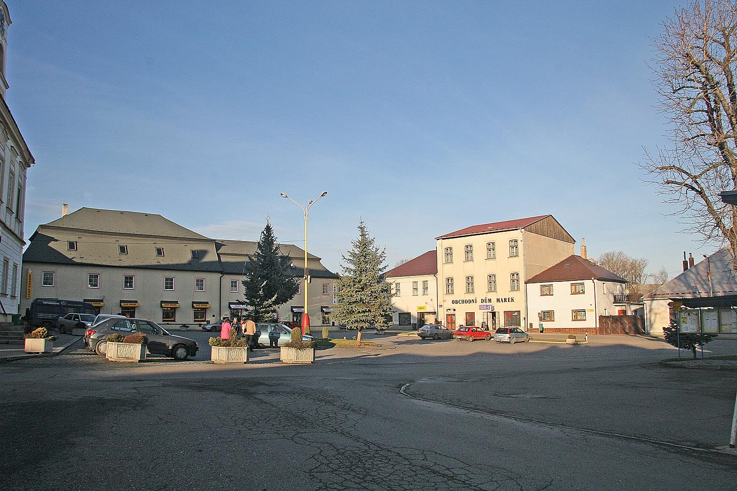 náměstí v městě Habry, district Havlíčkův Brod autor: Prazak date: 15. 12. 2006